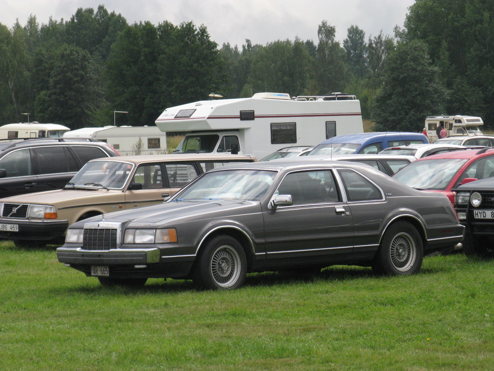 Lincoln Continental Mark 7